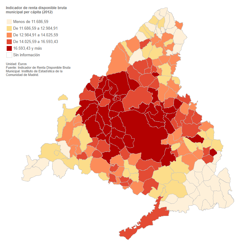 Indicador de renta disponible bruta municipal per cápita (2012)